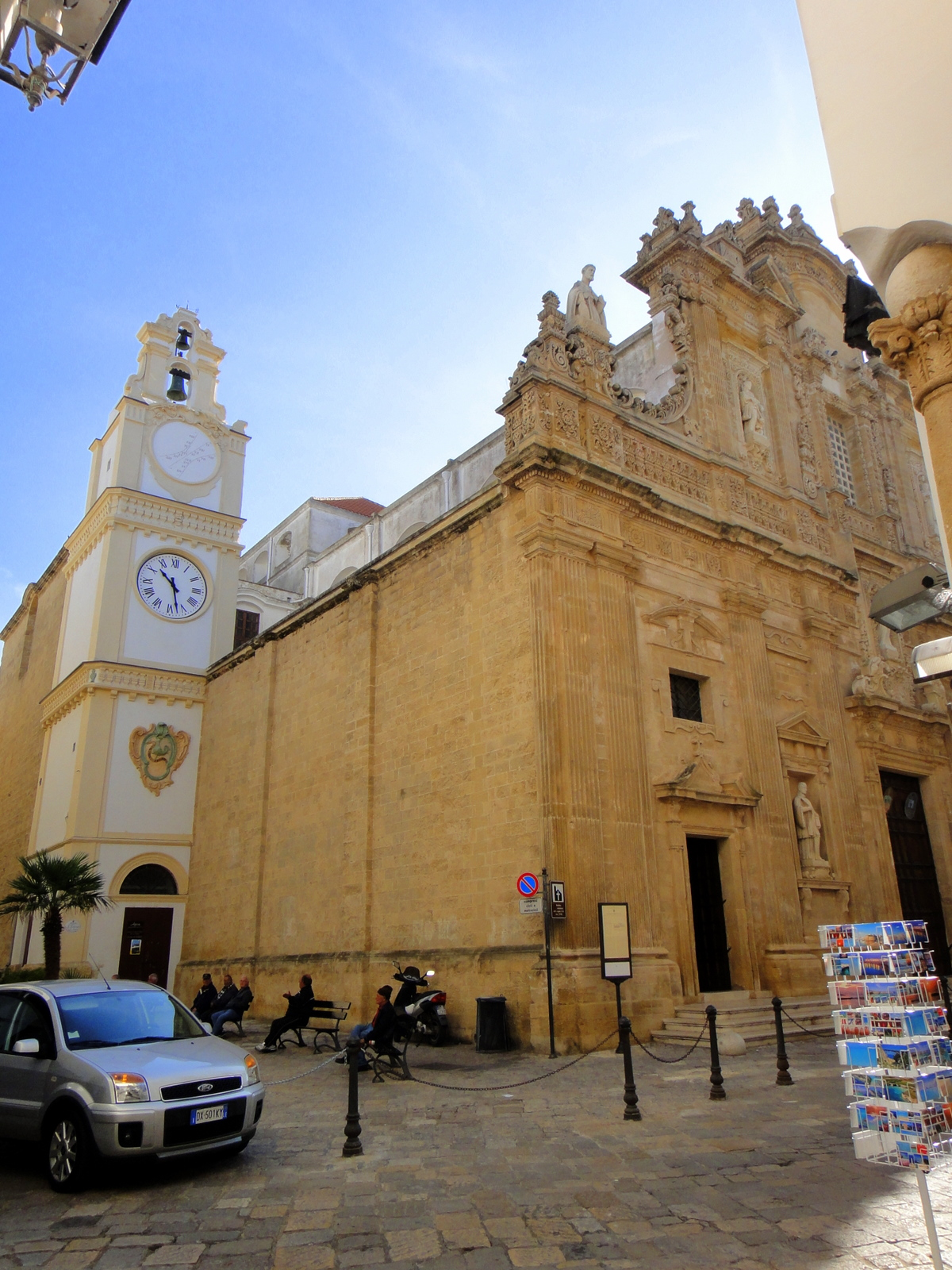 Gallipoli